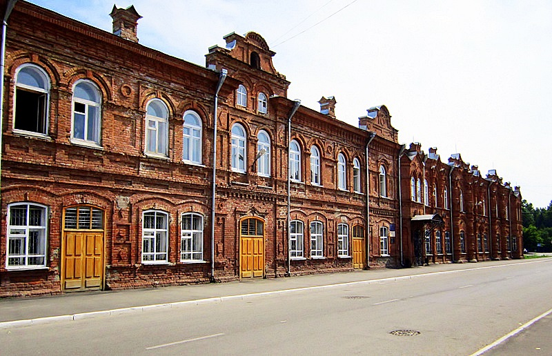 Бийск. Филологический факультет Алтайской гос. академии образования им. В.М. Шукшина.